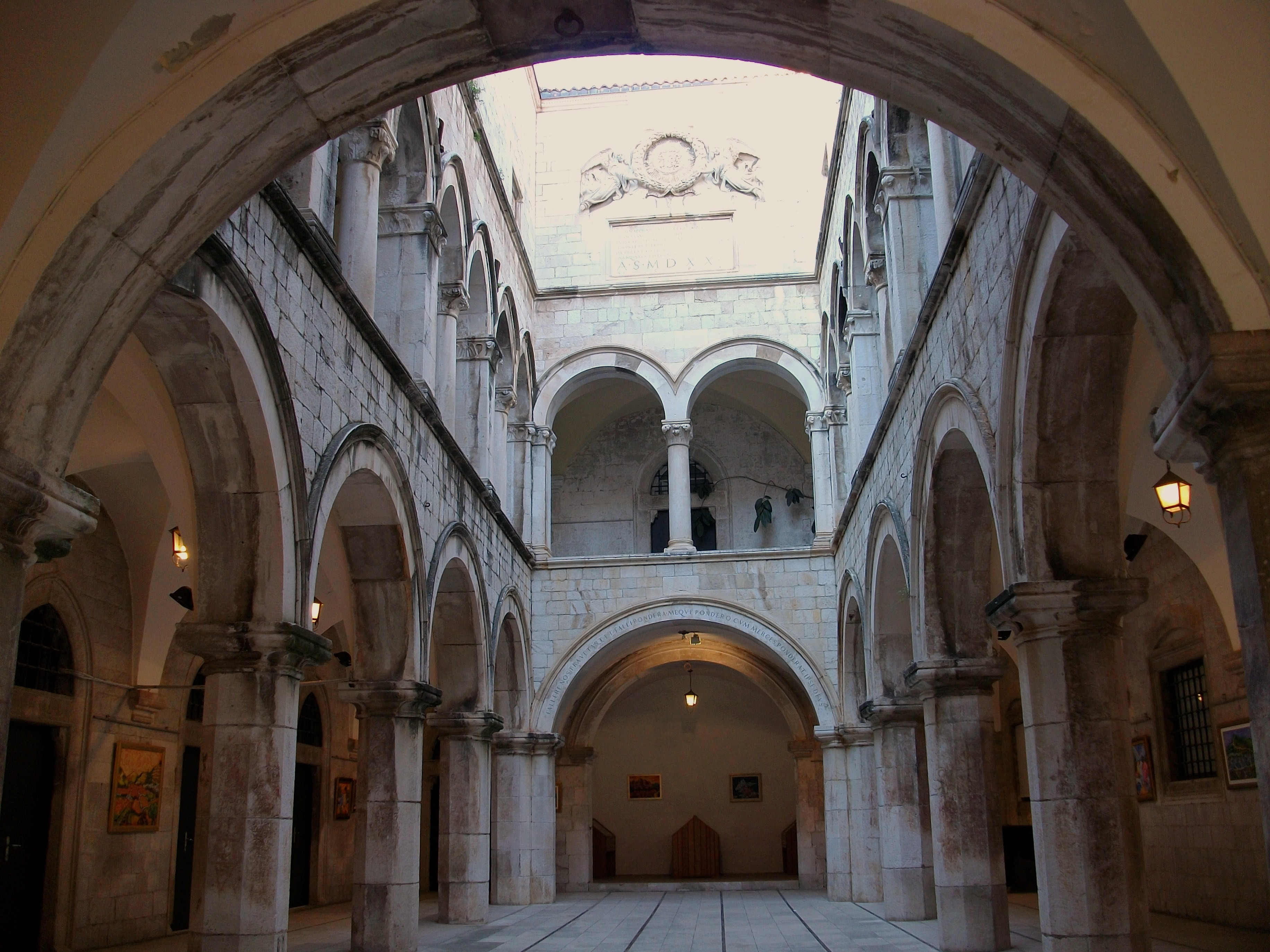 Pati del palau Sponza de Dubrovnik.